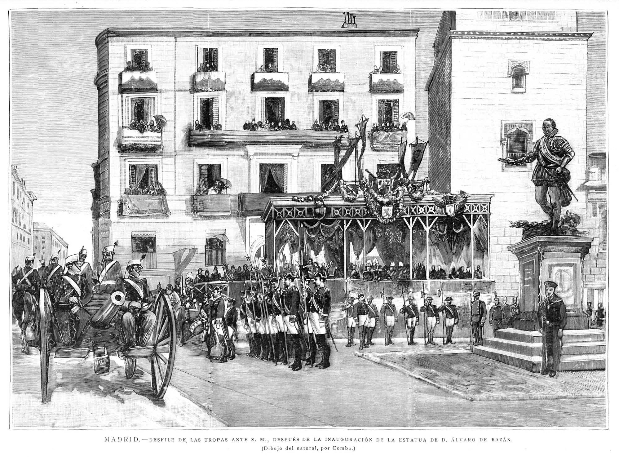 Madrid. — Desfile de las tropas ante su S. M., después de la inauguración de la estatua de D. Álvaro de Bazán, en la revista española La Ilustración Española y Americana.